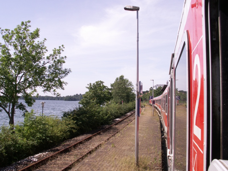 Bf Plön